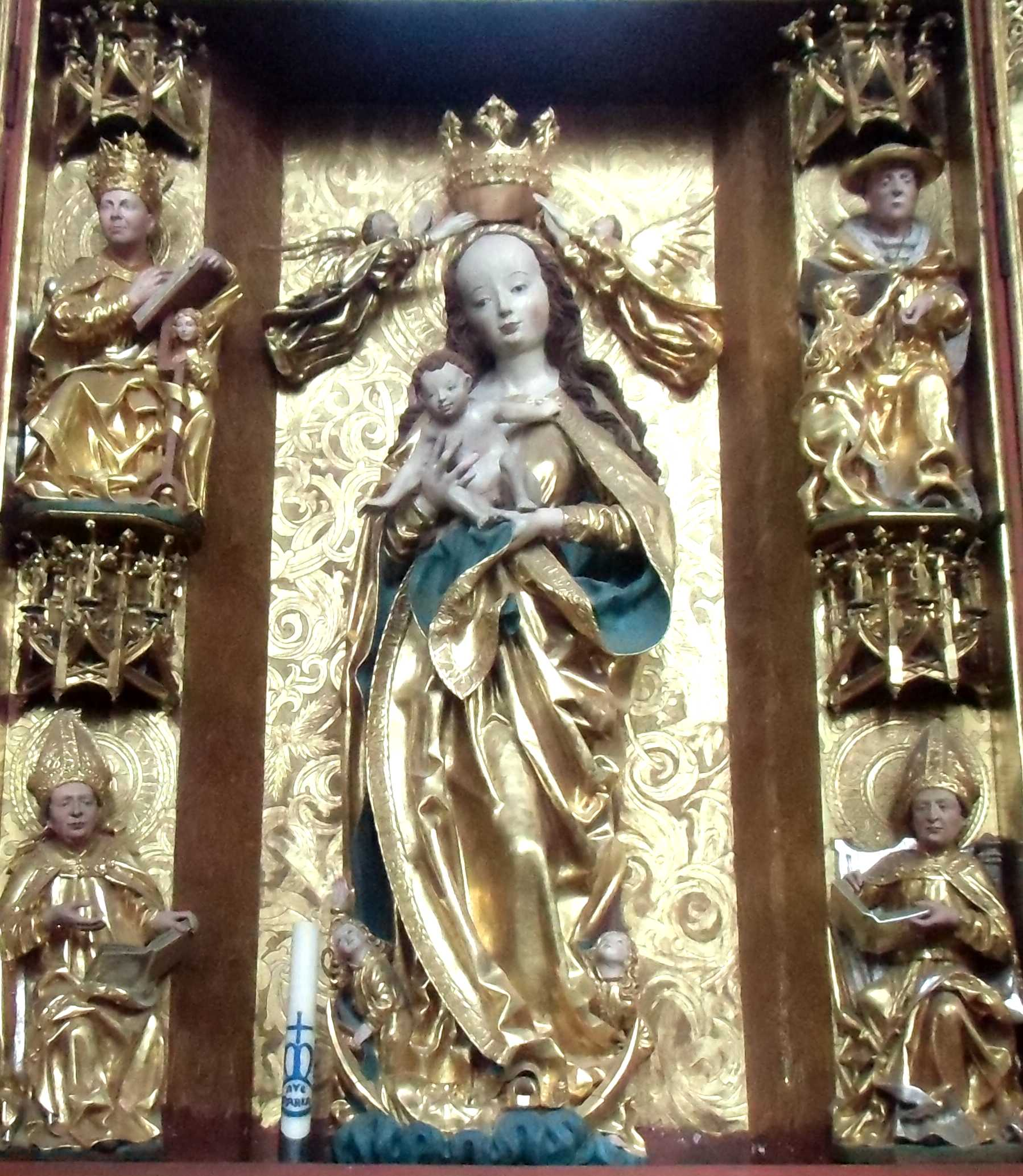 Mittelteil des alten gotischen Hauptaltars des Frauenburger Doms. Zu beiden Seiten Bildnisse von Kirchenvätern.